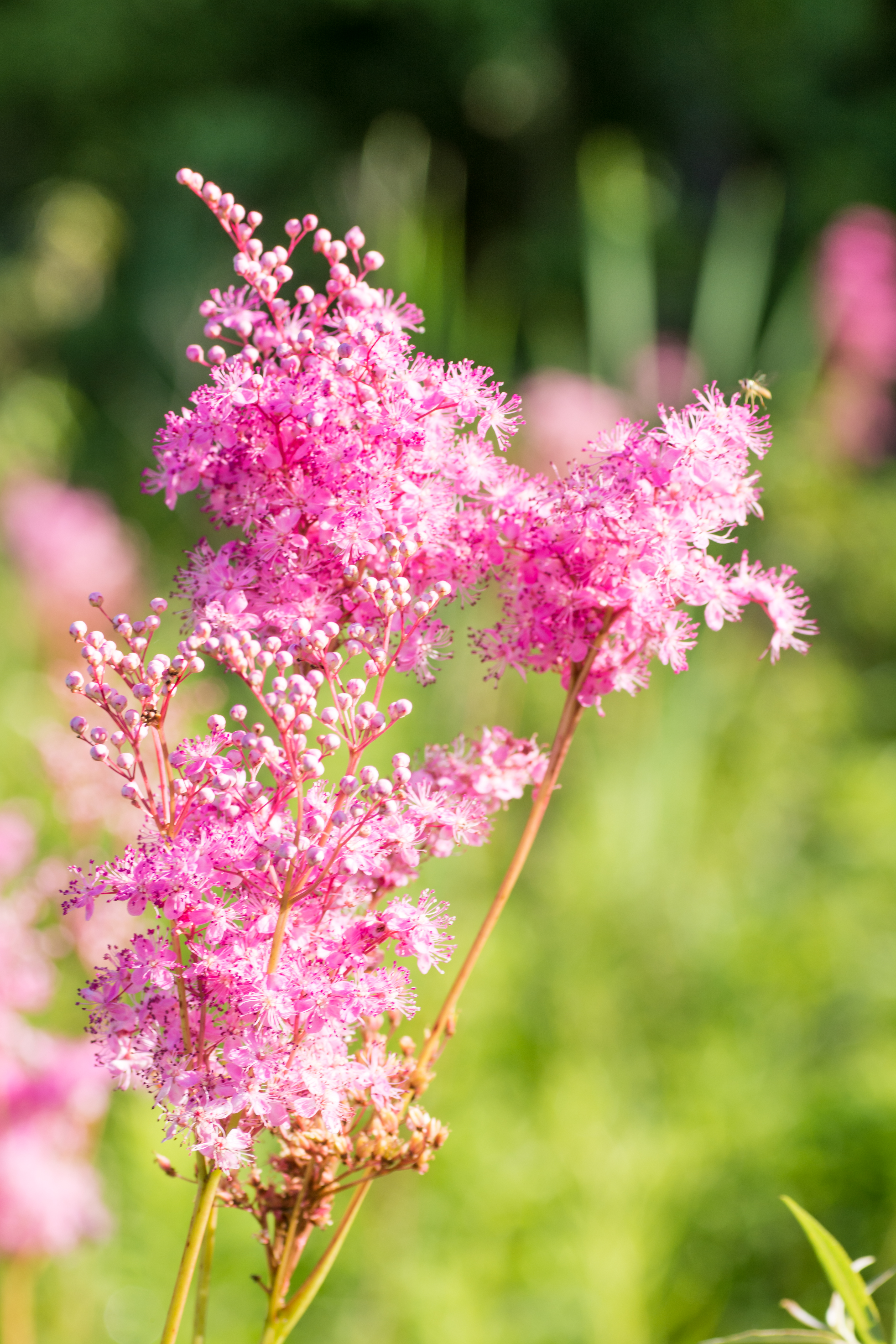 Siebenthaler Fen, Beavercreek, Ohio